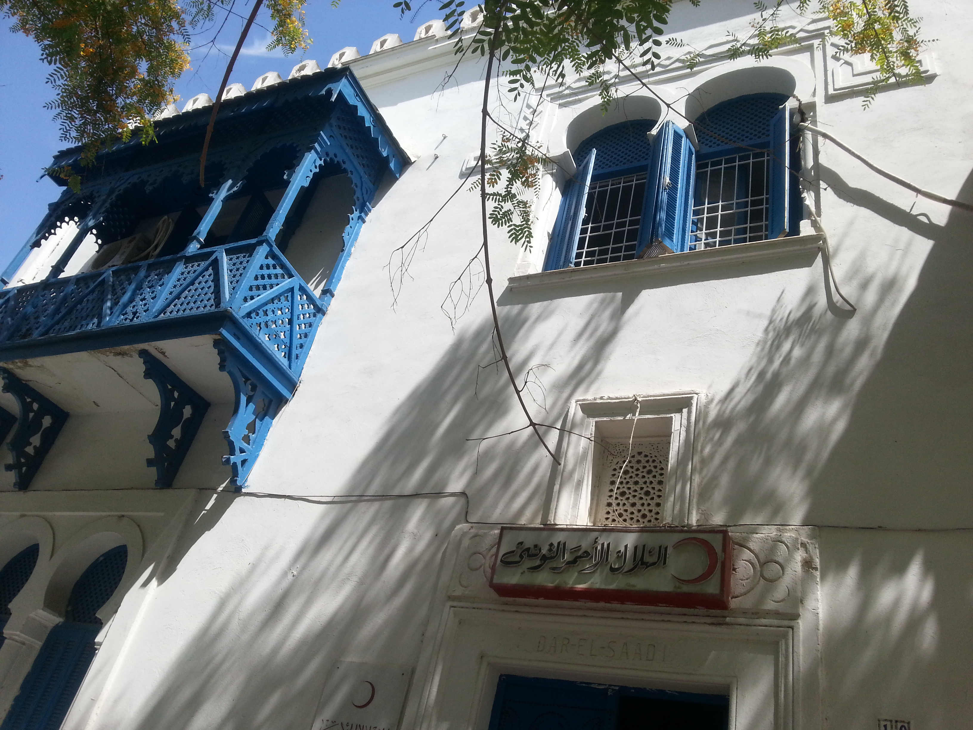 Façade du siège du Croissant rouge tunisien à Tunis